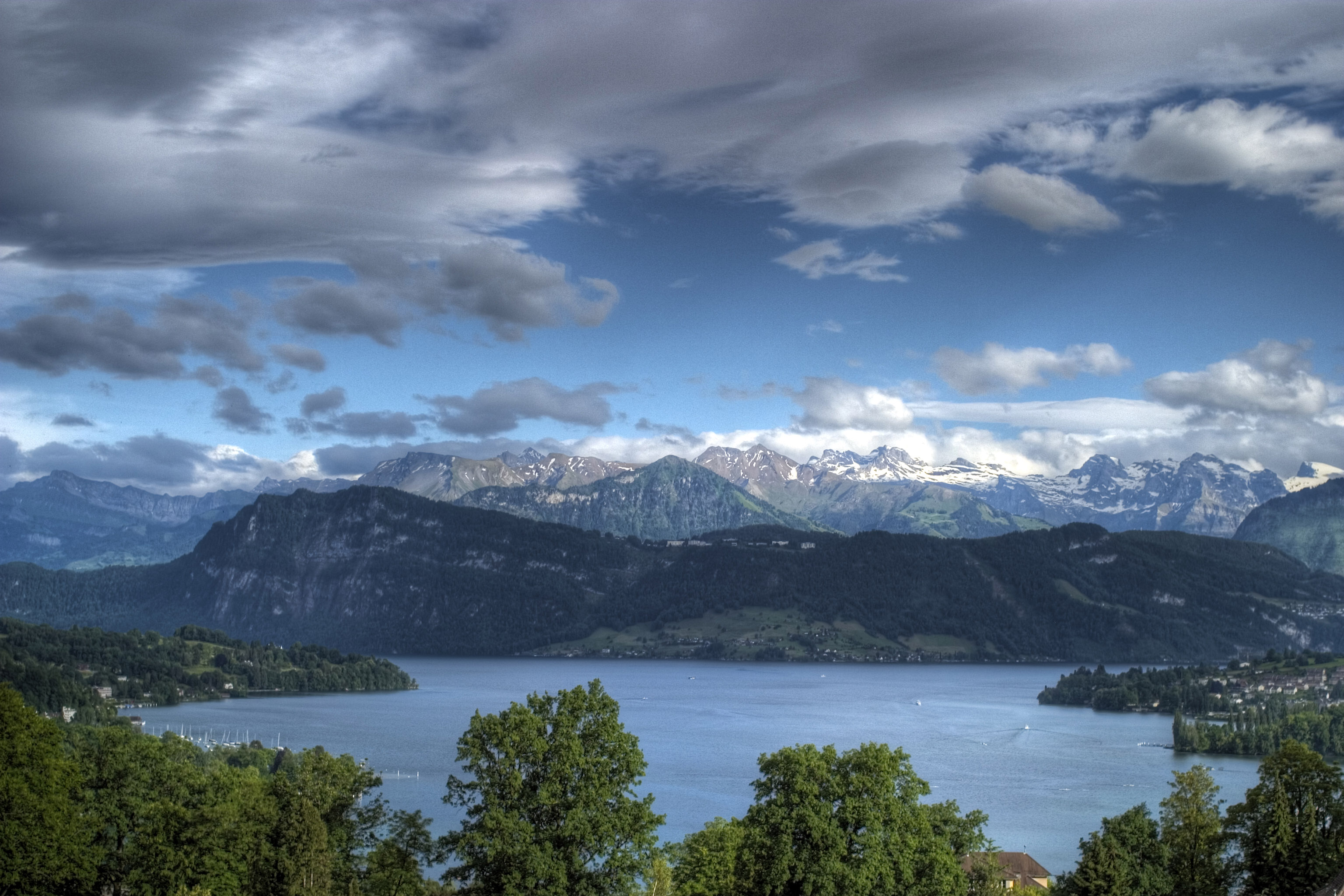 Panorama der Luzerner Voralpen. Standpunkt Konservatorium Luzern.